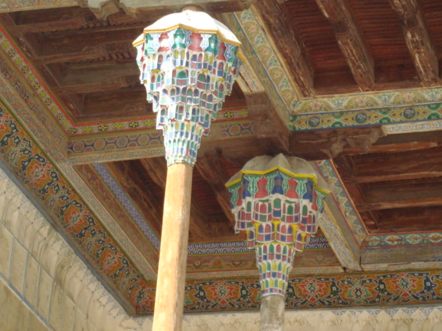 Chapiteaux à muqarnas et plafond de l'iwan de la mosquée Bolo Haouz de Boukhara